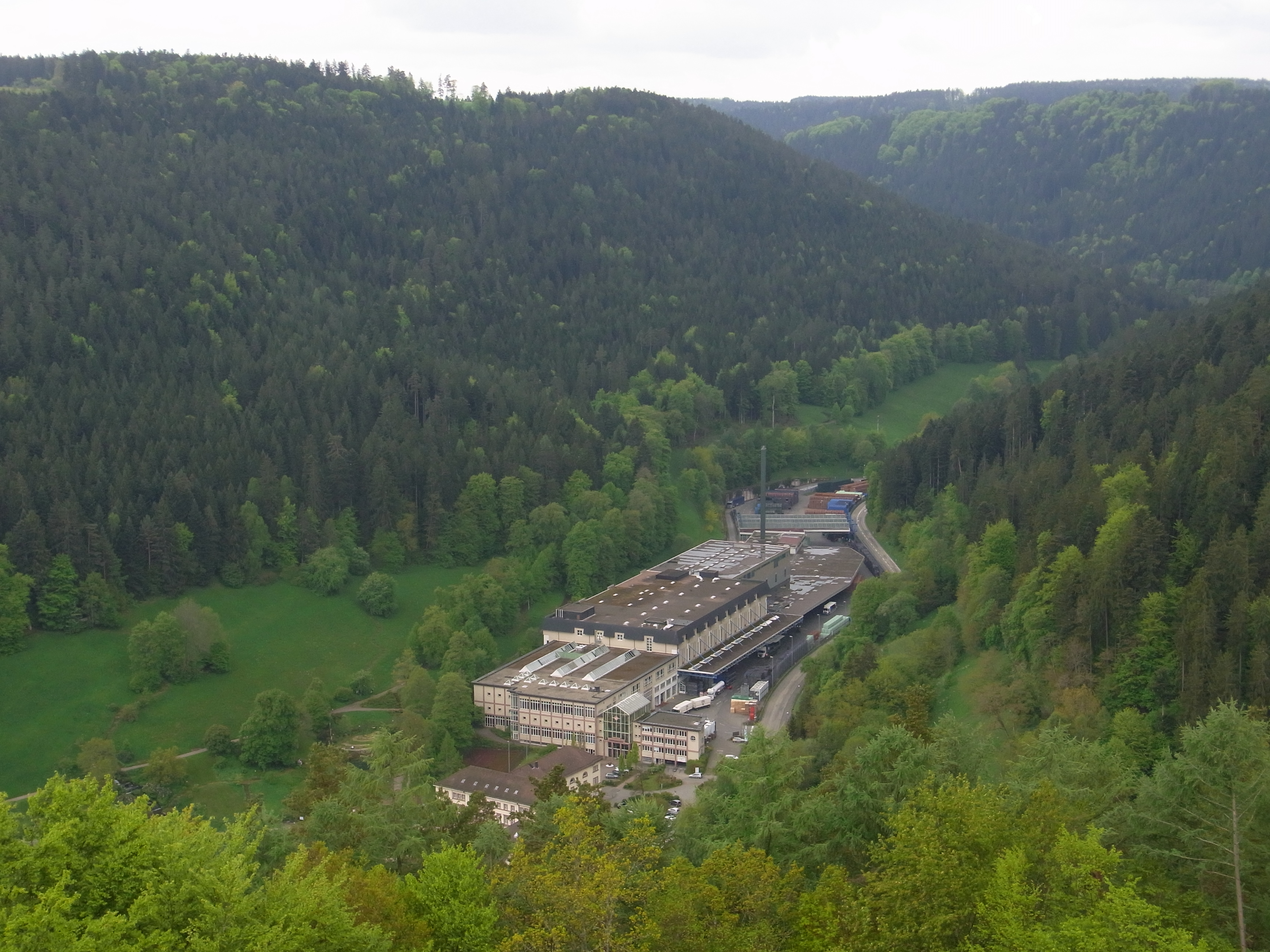 Blick von der Ruine Zavelstein